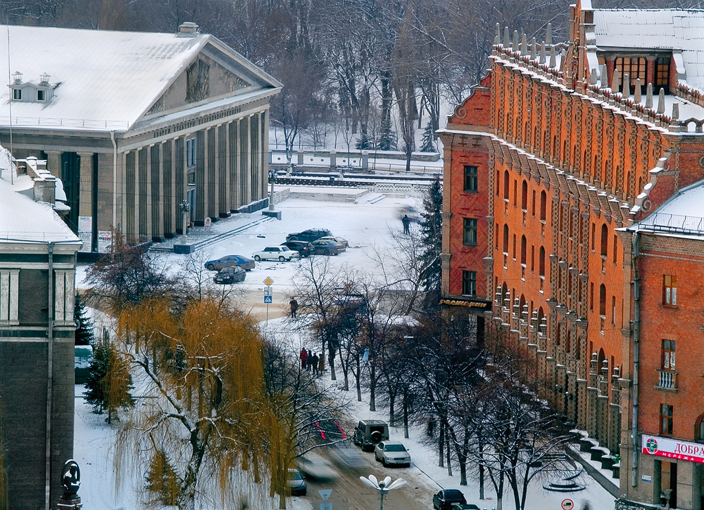 Луганск. Отель Украина.5 февраля 2007